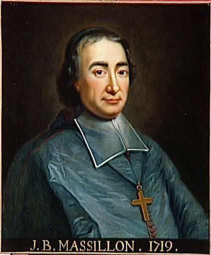 Jean-Baptiste Massillon, évêque de Clermont (1663-1742)